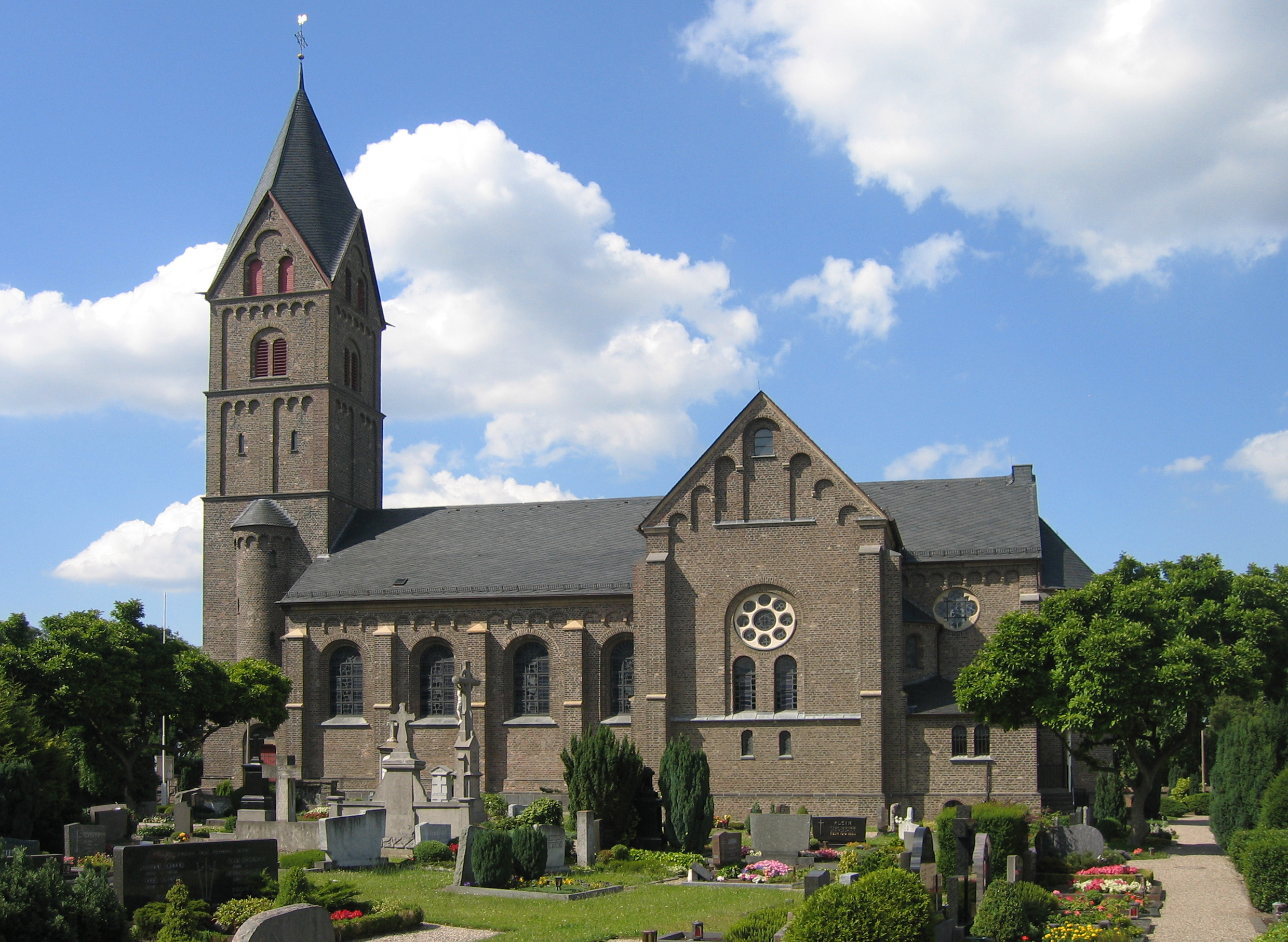 Katholische Kirche St.Servatius mit Friedhof in Köln-Immendorf This is a photograph of an architectural monument.